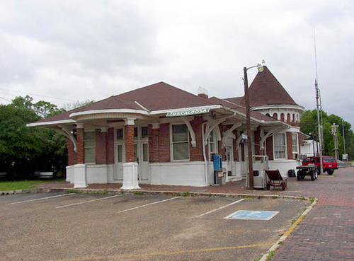 Tuscaloosa, Alabama Amtrak Station